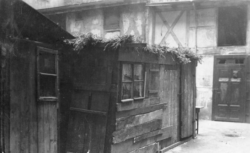 Berlin, im Scheunenviertel, Laubhütten In der Grenadierstraße in Berlin, Laubhütten [jüdisches Laubhüttenfest im Herbst] 1933 [Berlin.- Laubhütten in der Grenadierstraße (heute Almstadtstraße) im sogenannten "Scheunenviertel"]